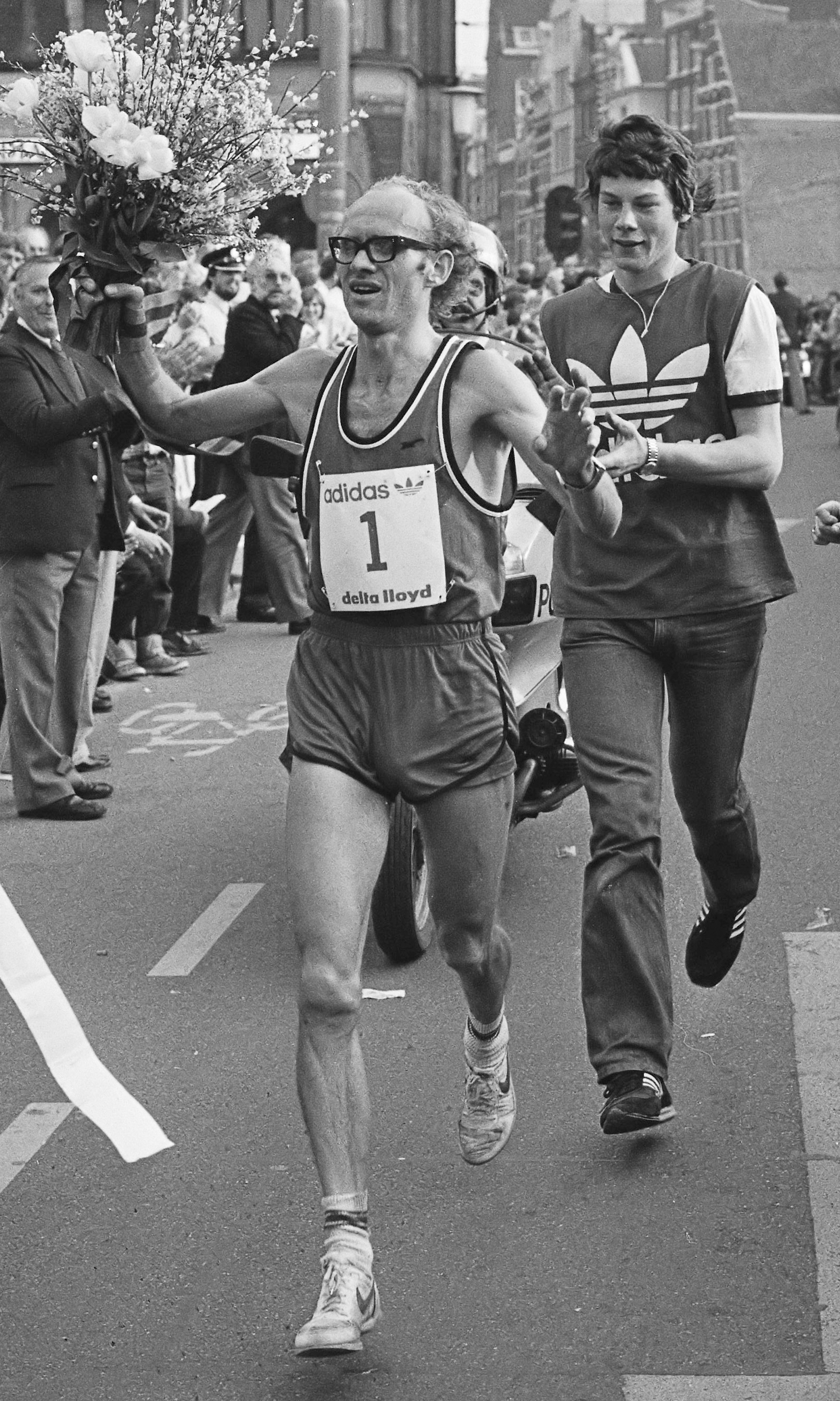 Aankomst Marathon van Amsterdam op de Dam, finish van de winnaar Ference Szekeres (Hongaar) op de Dam 9 mei 1981